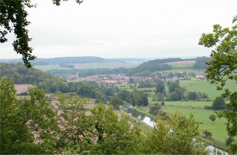 France - département 55 (Meuse)- Demange-aux-Eaux Paysage, point de vue de la route de Reffroy Photo prise en septembre 2005 par F5ZV 15 décembre 2005 à 19:57 (CET) Taille 600*800 Licence GFDL Licensing Catégorie:Image de commune de la Meuse